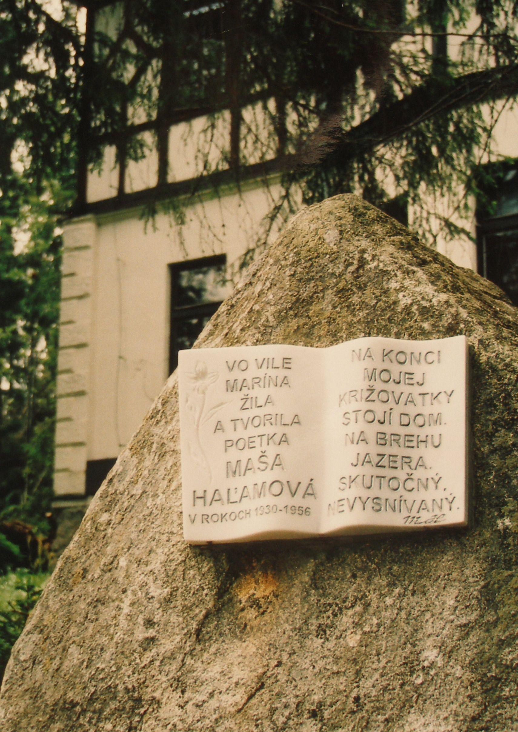 Tatranská osada Štrbské Pleso